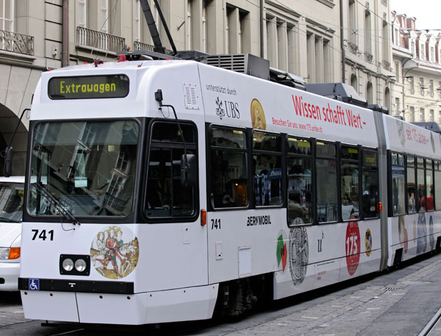 Das Spezialtram zum 175-Jubiläum der Universität Bern fährt durch die Berner Altstadt.